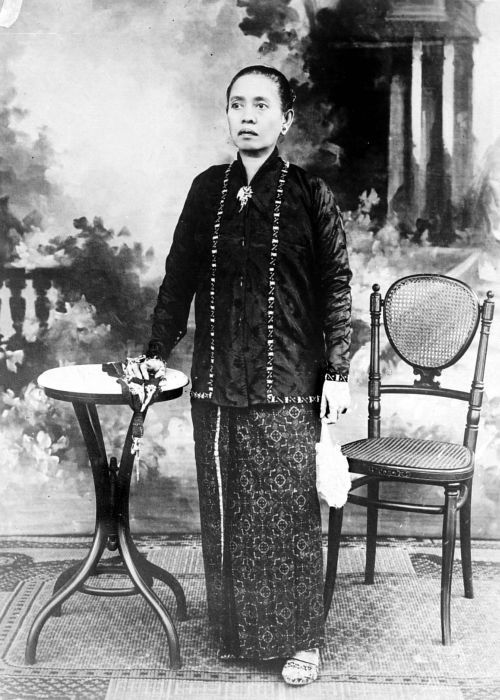 Repronegatief. Gemalin van Z.M. Mangkoe Negoro VI (1896-1916), prins van Soerakarta.